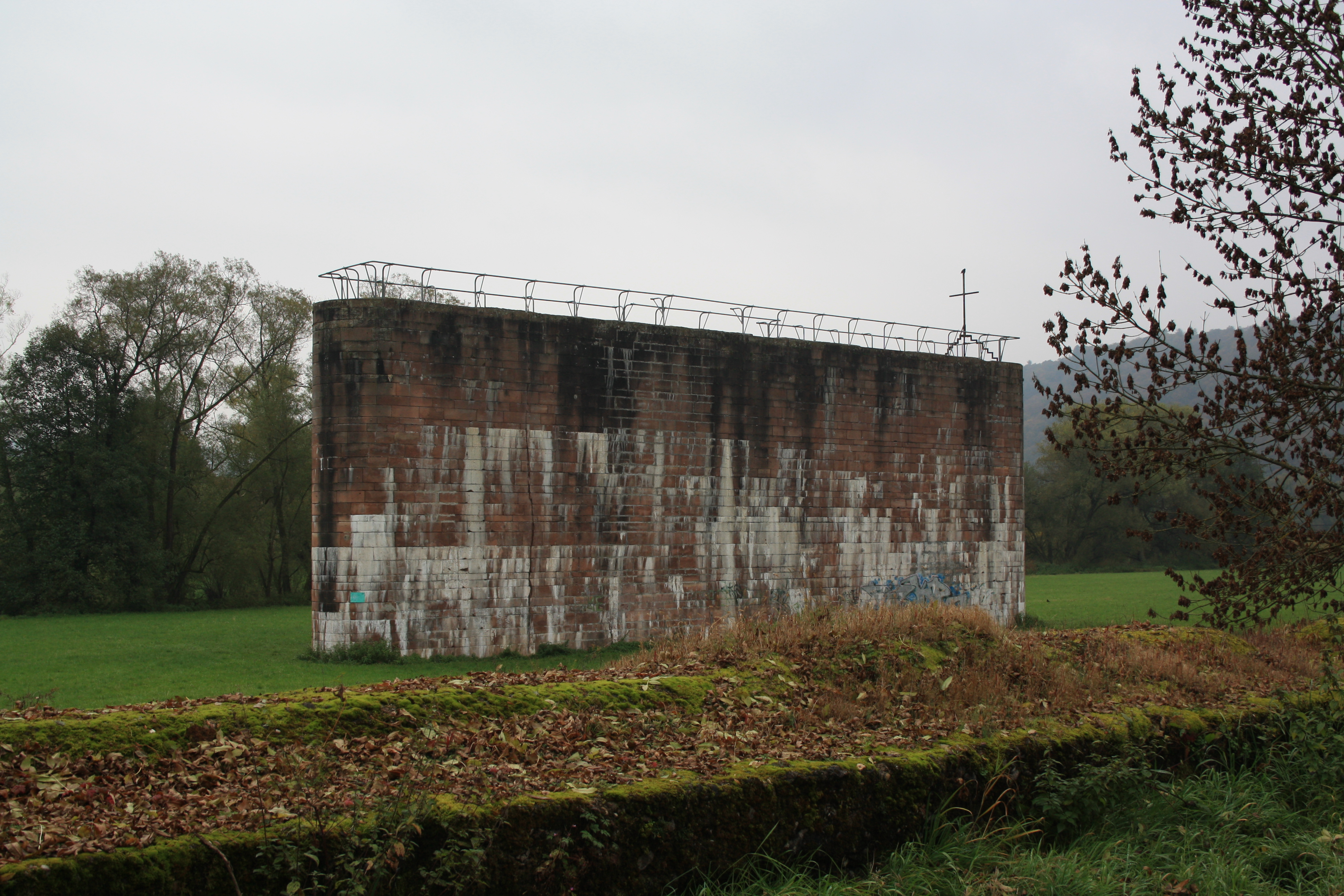 Unvollendeter Brückenpfeiler der "Strecke 46" zwischen Gräfendorf und Schonderfeld.